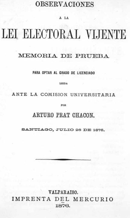 Portada del libro de Arturo Prat